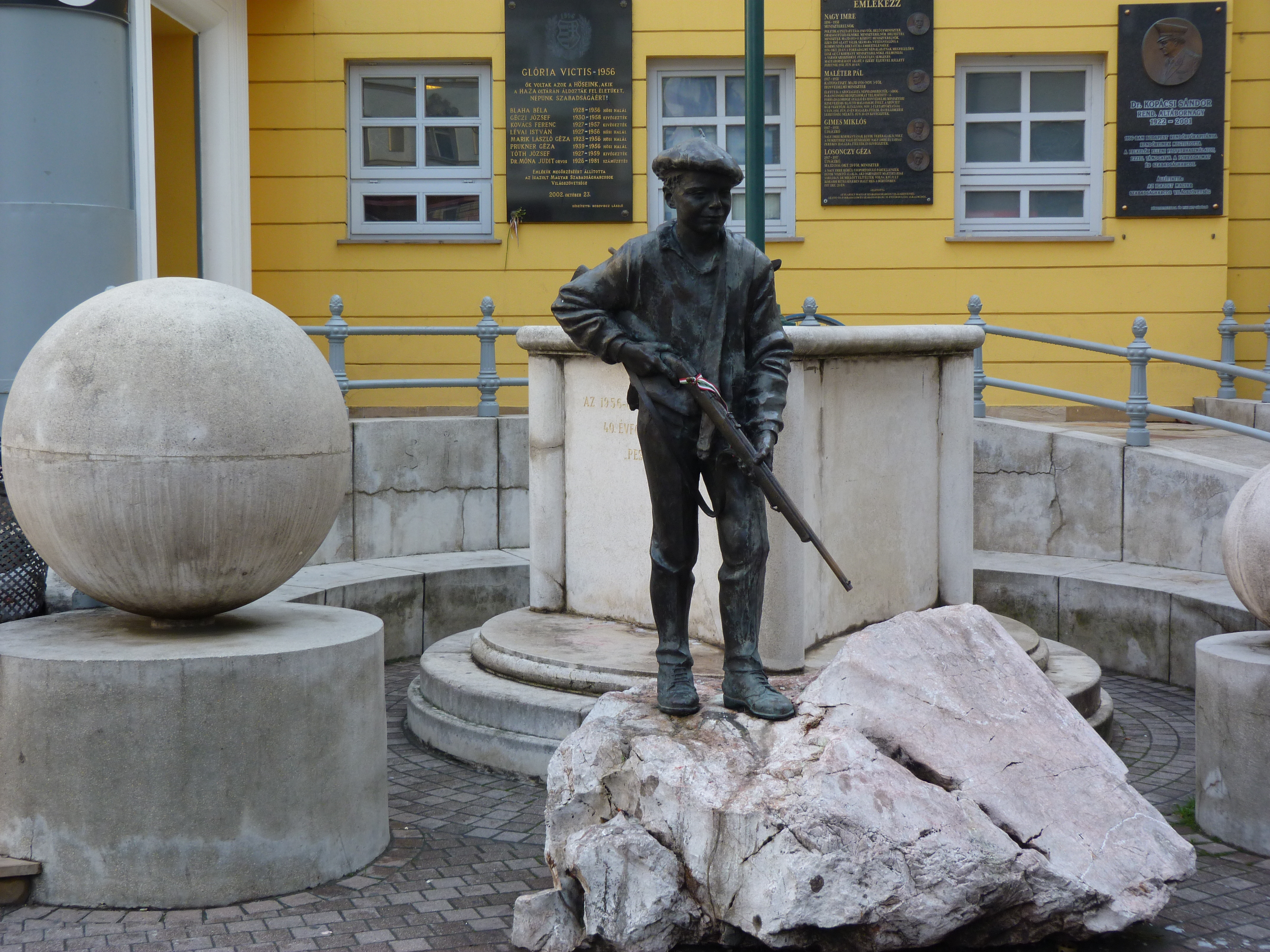 A felvétel 2012. december 5 -én készült Budapesten, a Józsefvárosban. Corvin köz. Az 56-os pesti srác emlékműve (Győrfi Lajos, 1996)